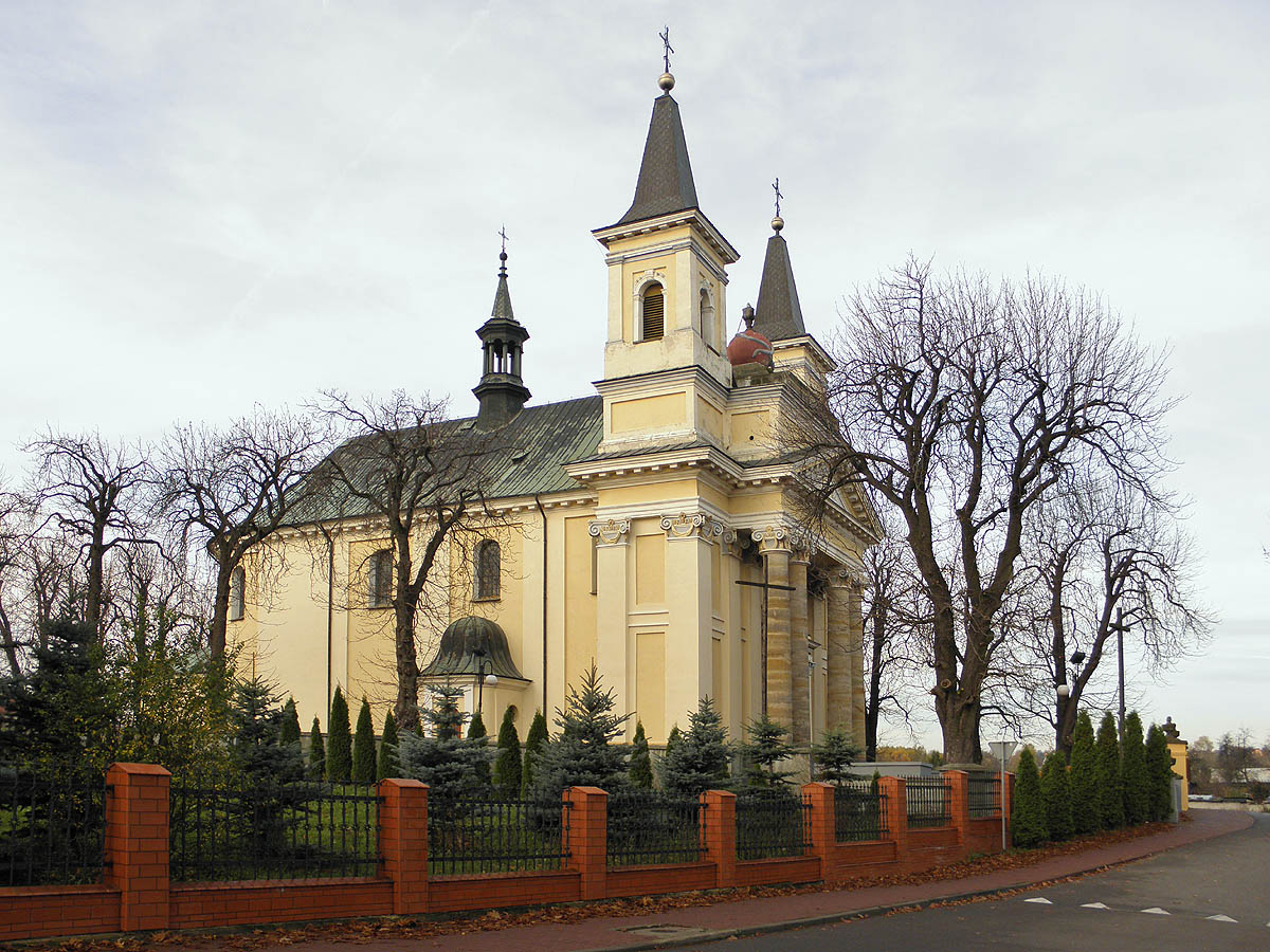 Przysucha, kościół par. pw. św. św. Jana Nepomucena i Ignacego Loyoli, 1780-1886, 1902